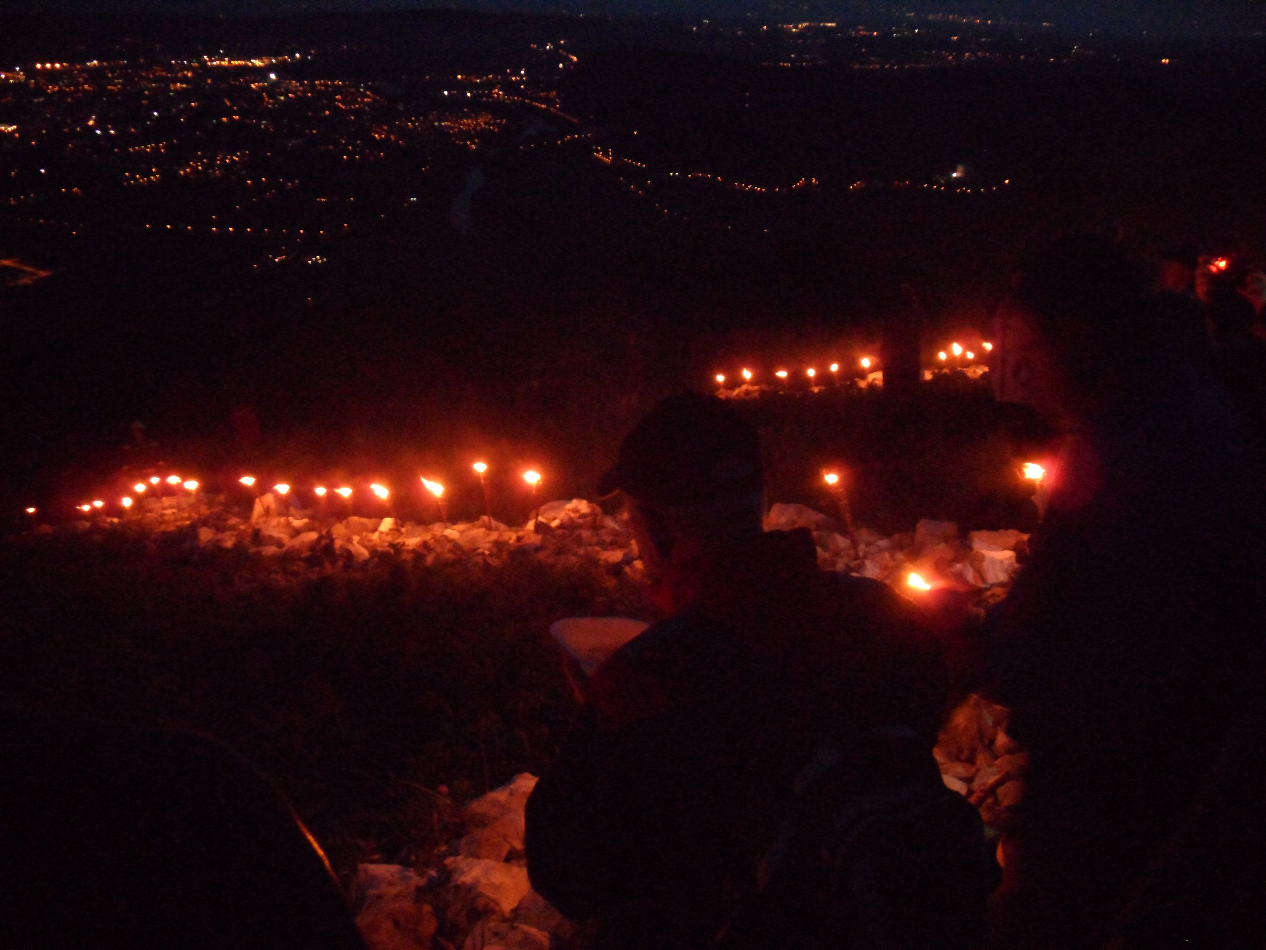 10. tradicionalna baklada na Sabotinu na predvečer dneva zmage, organizatorji: Območno združenje borcev NOB Nova Gorica (Skupina Maj 45) in Puntarji Slovenije (Gibanje za aktivno državljanstvo). Člani skupine Puntarji Slovenije (gibanje za aktivno državljanstvo) in člani sekcije Maj 45 so 8. maja zvečer ponovno izvedli tradicionalno prižiganje bakel ob napisu Tito na Sabotinu. Na enak način je napis Tito zasvetil še na treh drugih primorskih hribih - nad Renčami, Bukovico in Dekani. »Danes je boj proti fašizmu in nacizmu vsaj tako pomemben kot je bil v času italijanske okupacije in druge svetovne vojne. Bolj kot spomin je napis TITO opomin, da nam danes uničujejo javno zdravstvo, javno šolstvo, da razprodajajo podjetja in uničujejo delovna mesta. Medtem, ko vlade druga za drugo poslušno izpolnjujejo politiko neoliberalizma in po naročilu evropskih birokratov in finančnih centrov moči iztiskajo še zadnjo kapljo znoja iz navadnega človeka, mafijska sprega politike in kapitala nemotena prenaša milijarde v tujino, nam pa puščajo bedo, krizo in kredite,« so zapisali v pozivu na njihovi facebook strani. Slavnostni govornik je bil član predsedstva Združenja zveze borcev Milan Gorjanc. Nekaj pozdravnih besed so izrekli tudi Puntarji Slovenije, za glasbeni program je poskrbel raper Darko Nikolovski. Baklajade so bile na več koncih Primorske. Vrh Sabotina je v preteklosti dolgo časa nosil napis »Naš Tito«. Tega so aktivisti Puntarjev Slovenije in Zveze borcev NOB aprila 2014 obnovili in spremenili v »Tito«. Črke so visoke 25 metrov, v dolžino pa meri napis skoraj sto metrov. Neznanci so napis v noči med 7. in 8. majem 2014 kamne premetali v napis JJ, ki pa na Sabotinu ni ostal dolgo viden.